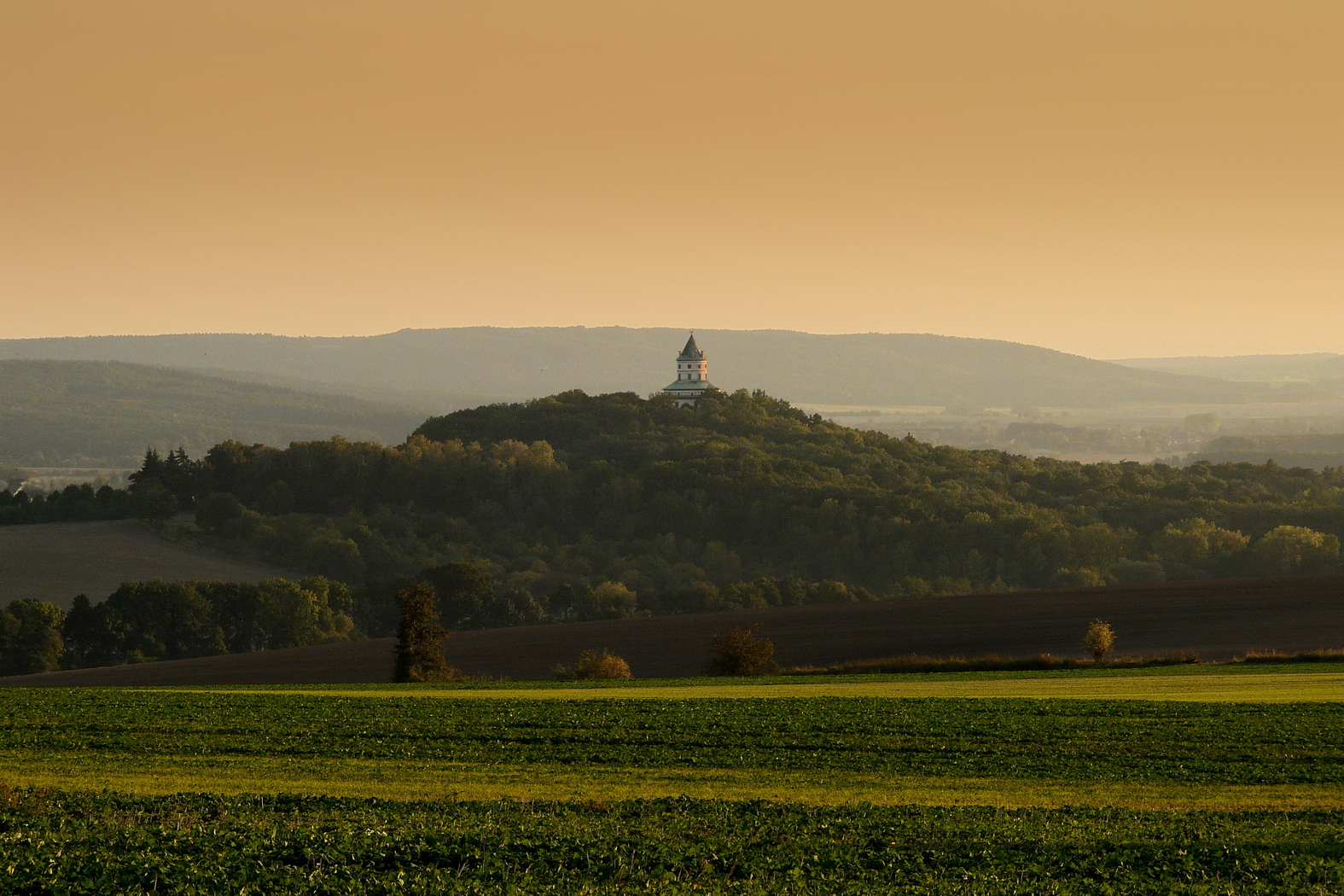 Humprecht od vrchu Hůra